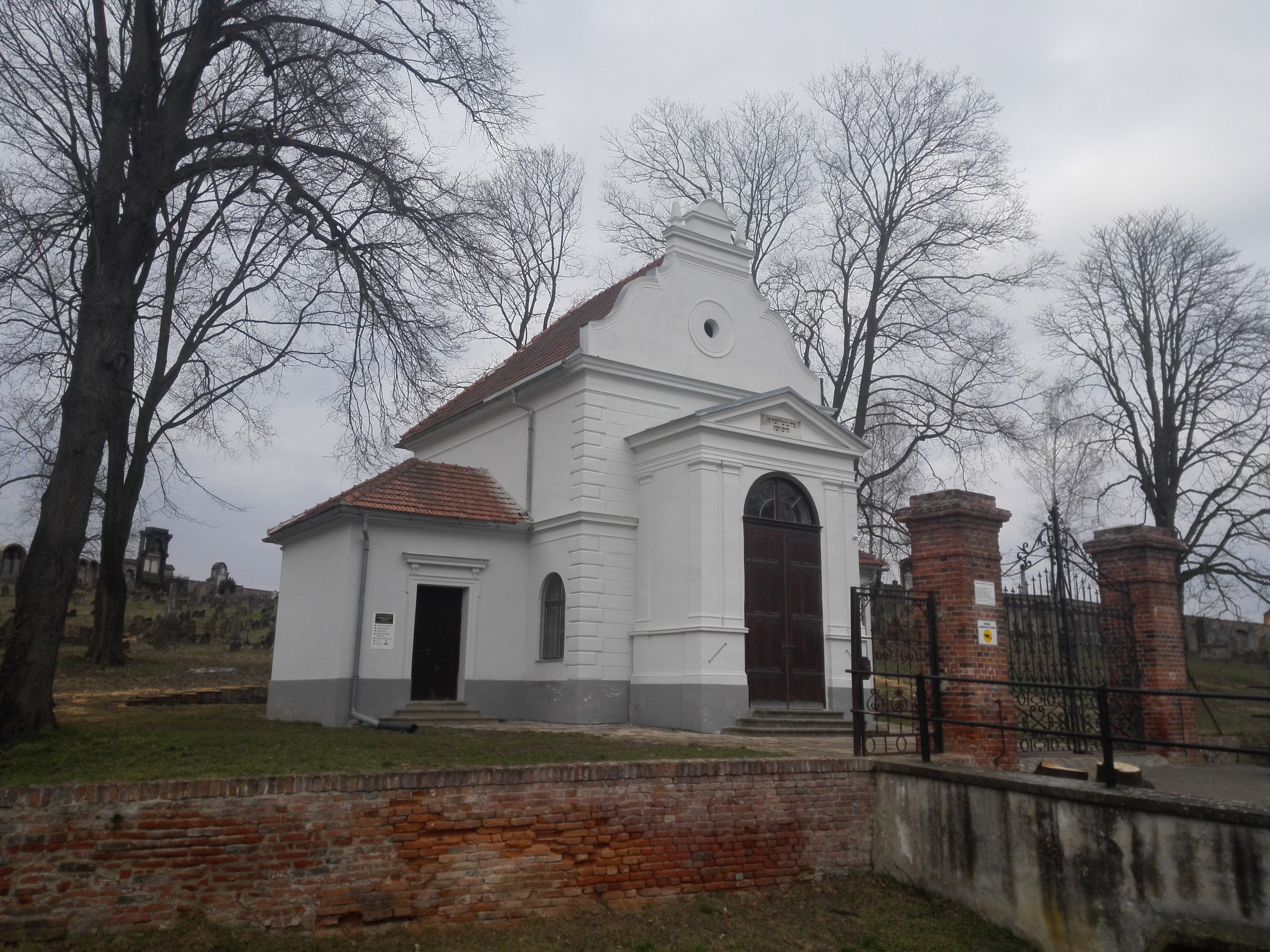 Obřadní síň židovského hřbitova ve městě Ivančice, okres Brno-venkov, Jihomoravský kraj.